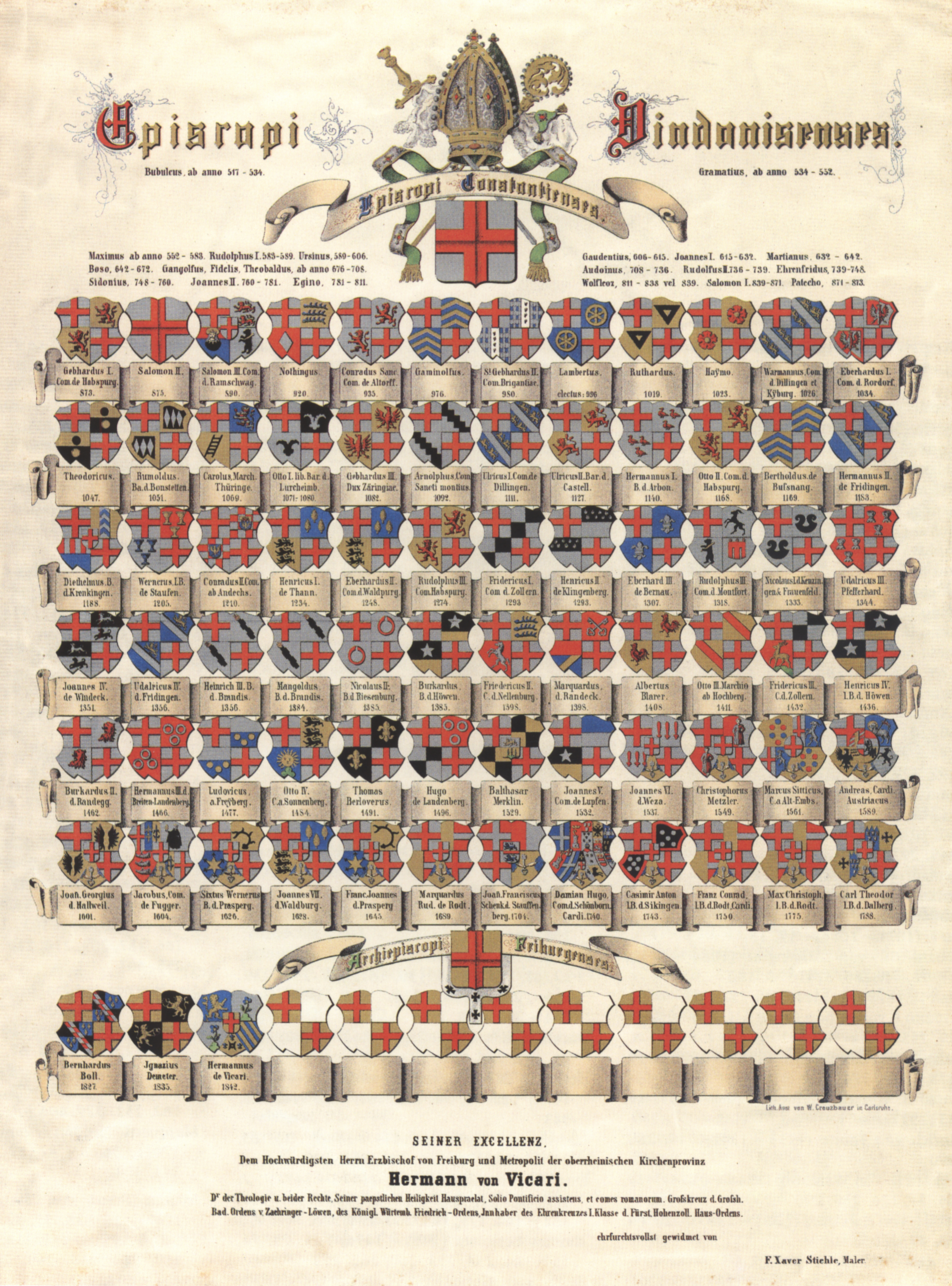 Wappentafel der Bischöfe von Konstanz, Mitte 19. Jh. von Franz Xaver Stiehle (bis zum Spätmittelalter Fantasiewappen; später teilweise unzuverlässig, im Mittelalter bei Amtsträgern in Doppelfunktion teilweise mit anderen Bistums-/Abtswappen angereicherte Schilde)